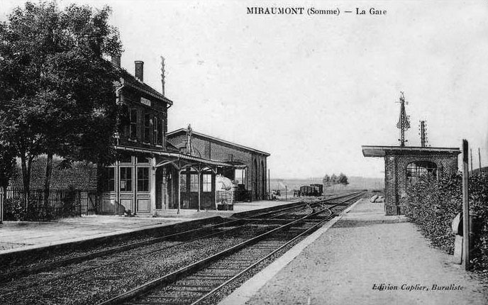 La gare de Miraumont, sur la ligne de ligne de Paris à Lille, au début des années 1900.